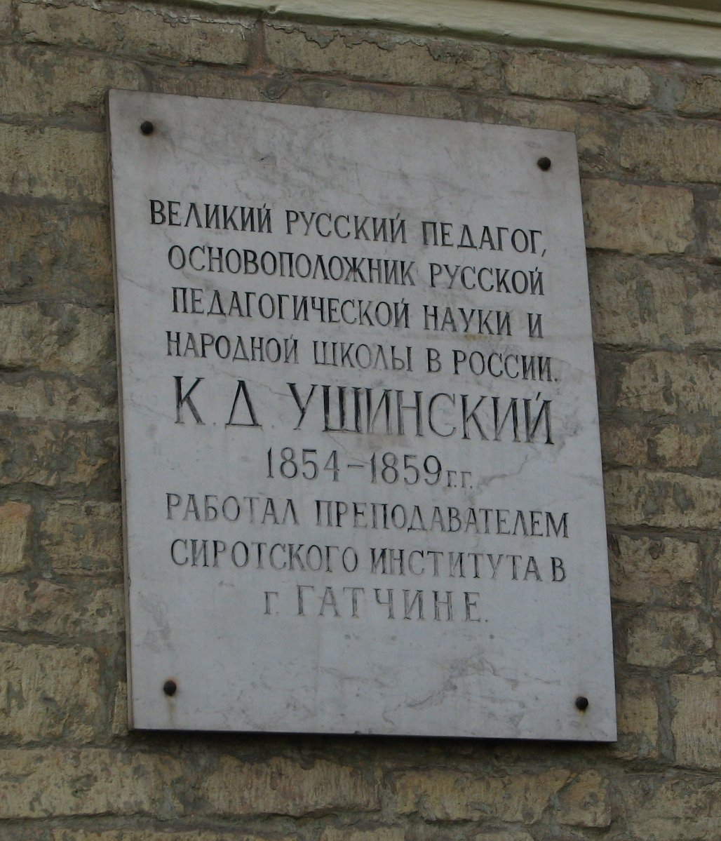 Мемориальная доска на здании Сиротского института в Гатчине